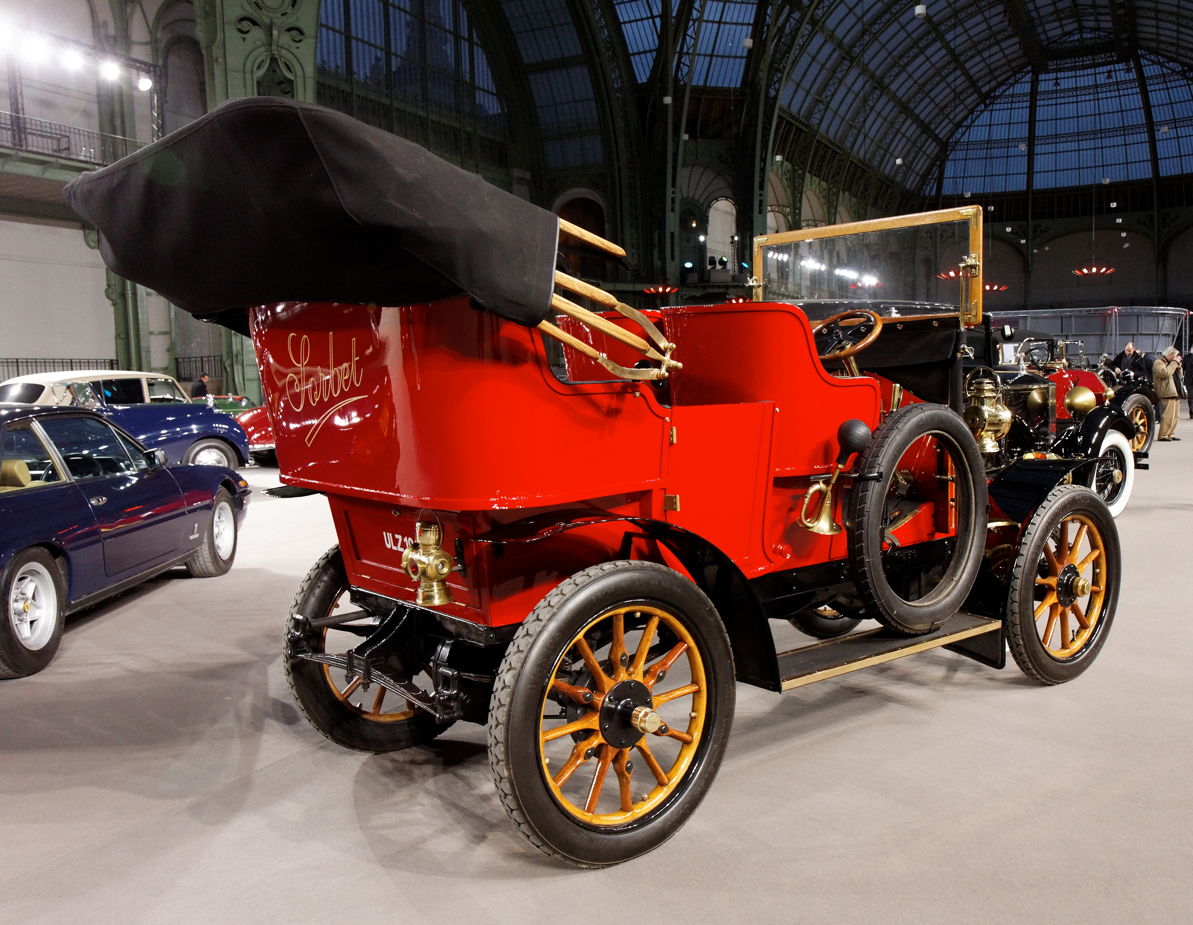 Renault Type Y-A bicylindre 10 HP Double Phaéton roi-des-belges